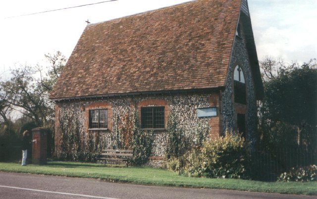 St Peters Chapel